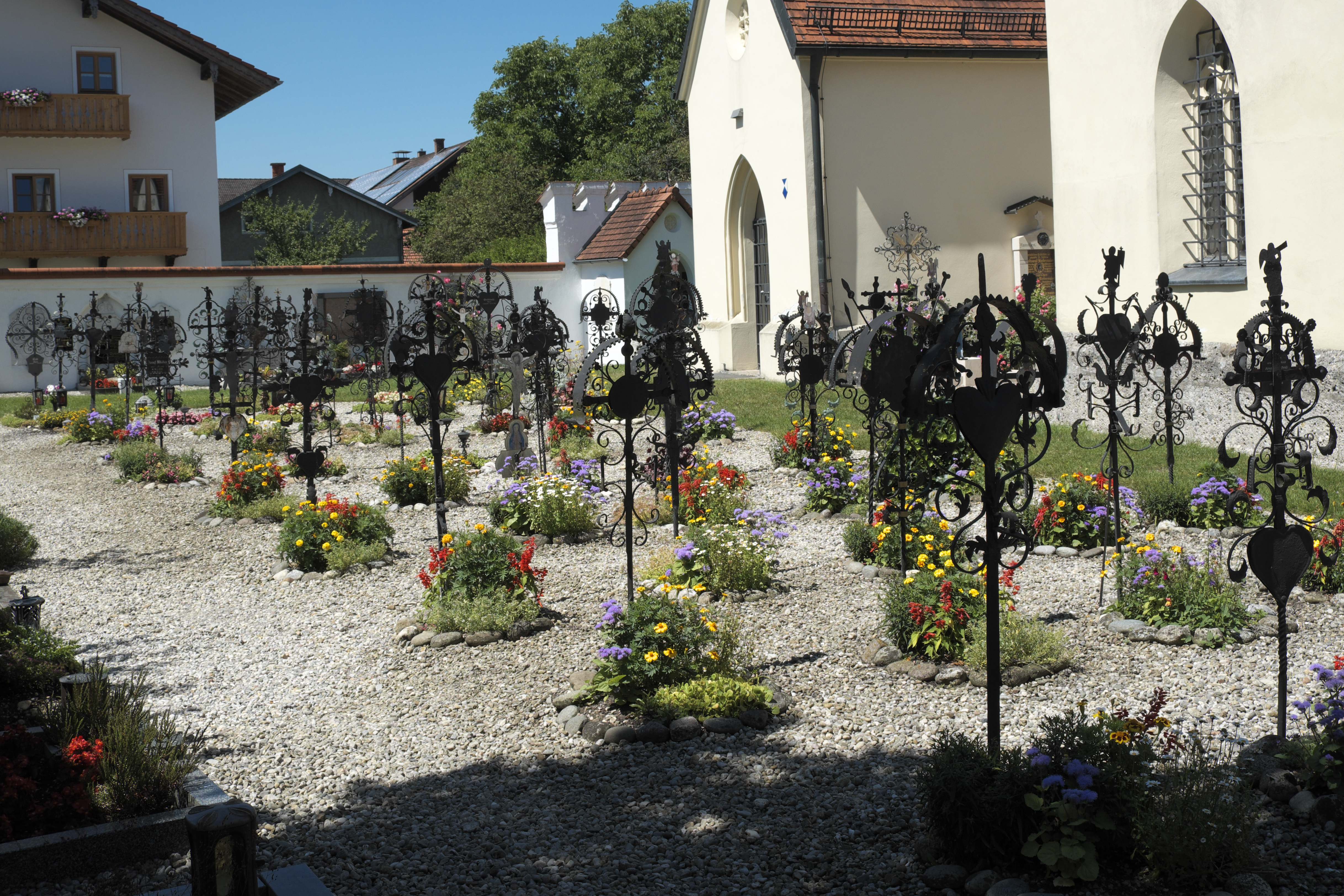 Friedhof an der katholischen Filialkirche St. Jakobus der Ältere in Rabenden, einem Ortsteil von Altenmarkt an der Alz im Landkreis Traunstein (Bayern/Deutschland), schmiedeeiserne Grabkreuze